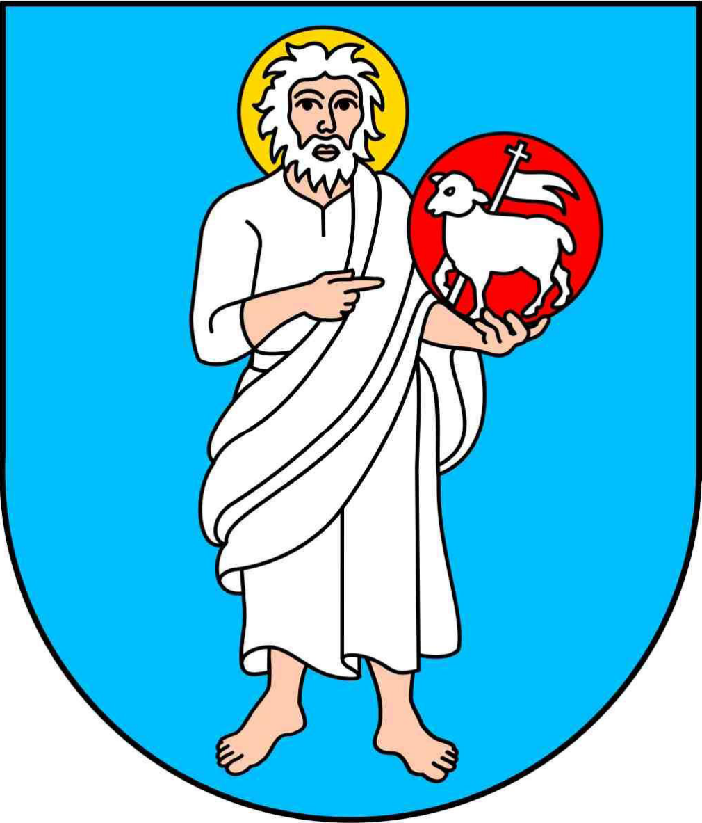 Herb gminy Nowe Miasto